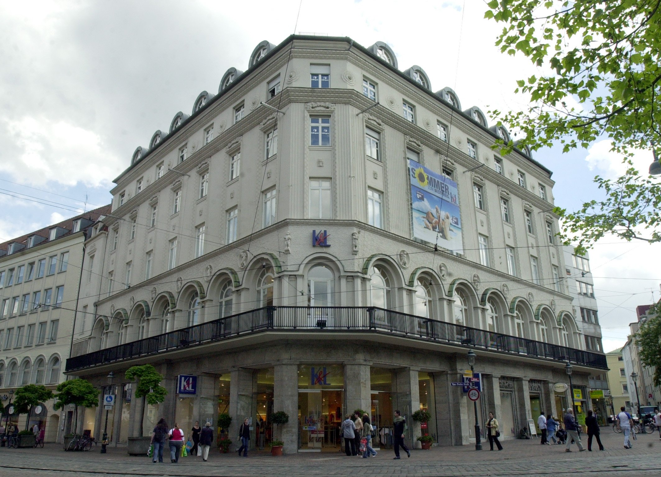 K&L Ruppert Store in Augsburg